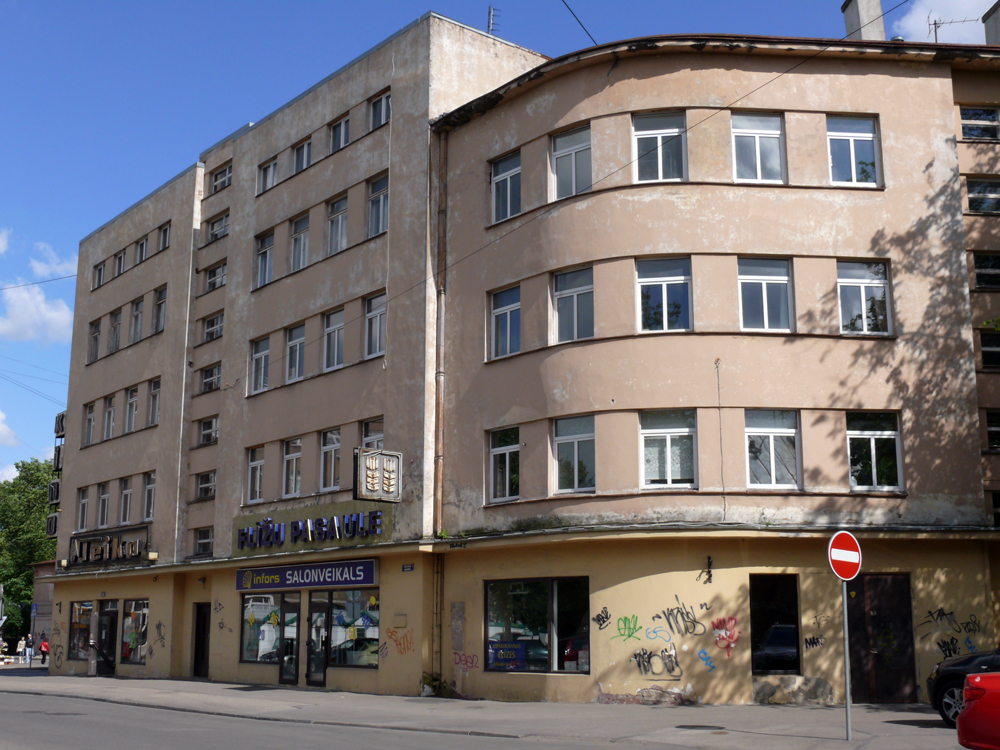 Kinoteātra "Teika" ēka. Celta 1937. gadā (arh. T.Hermanovskis), funkcionālisma arhitektūras paraugs, vietējas nozīmes arhitektūras piemineklis. Fotogrāfējis A.Buks.